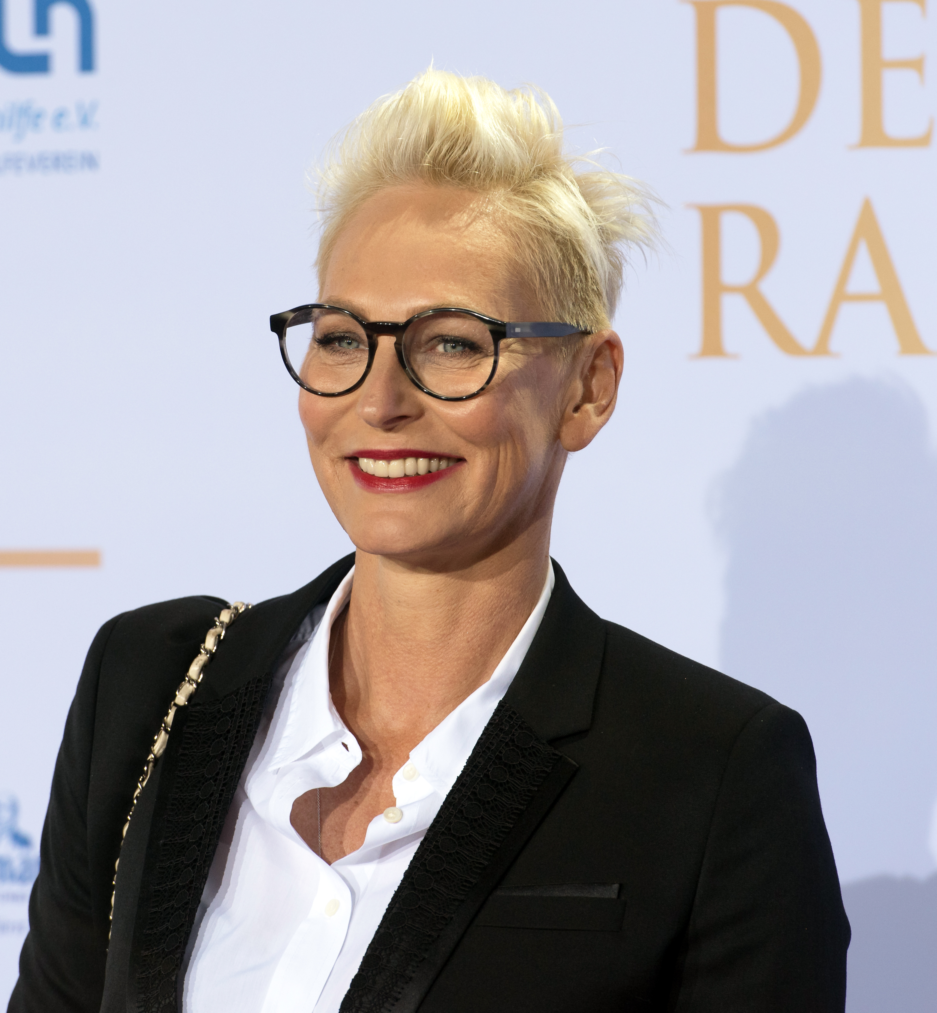 Bärbel Schäfer beim Deutschen Radiopreis 2016 im Schuppen 52 in Hamburg